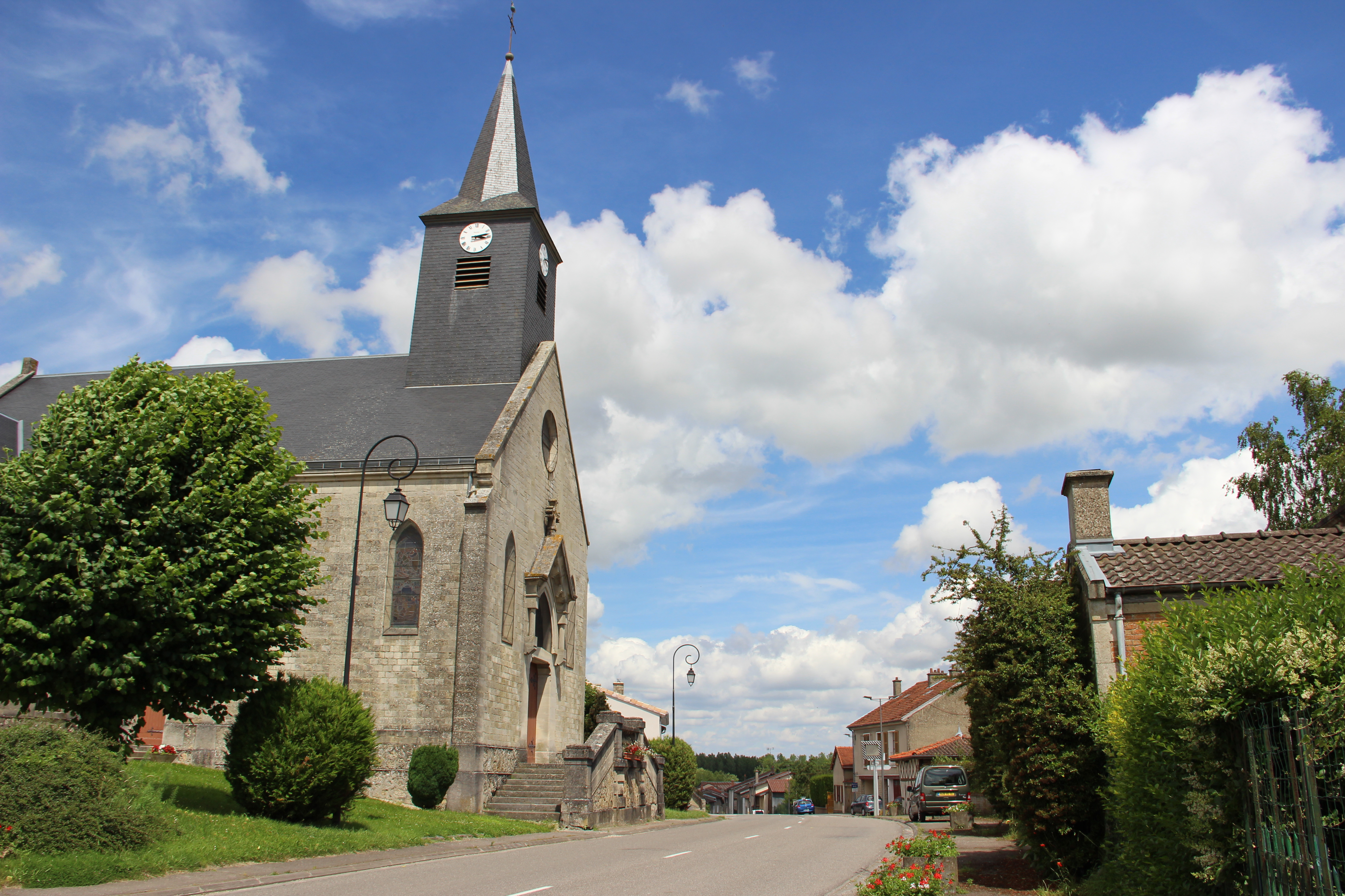 La rue principale et l'église